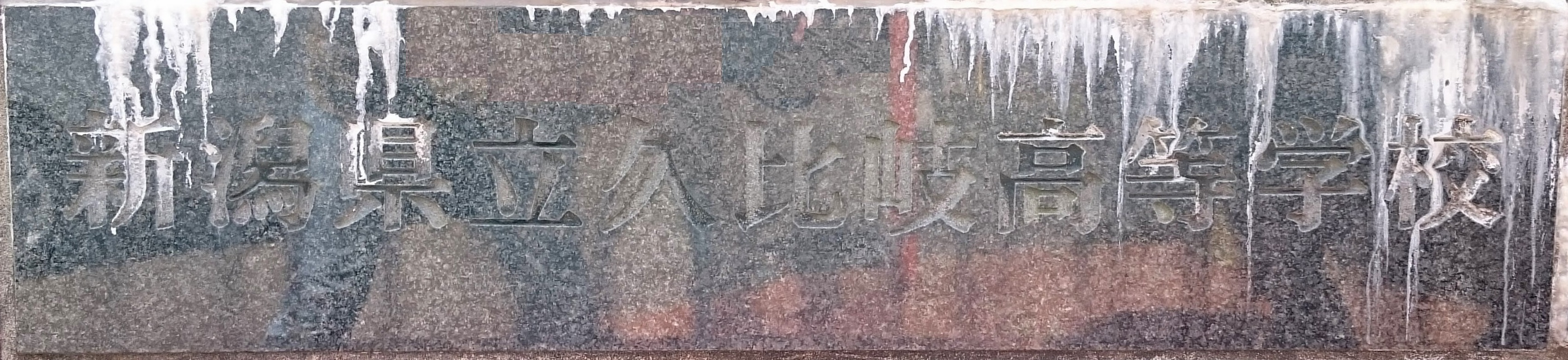 新潟県立久比岐高等学校の学校表示